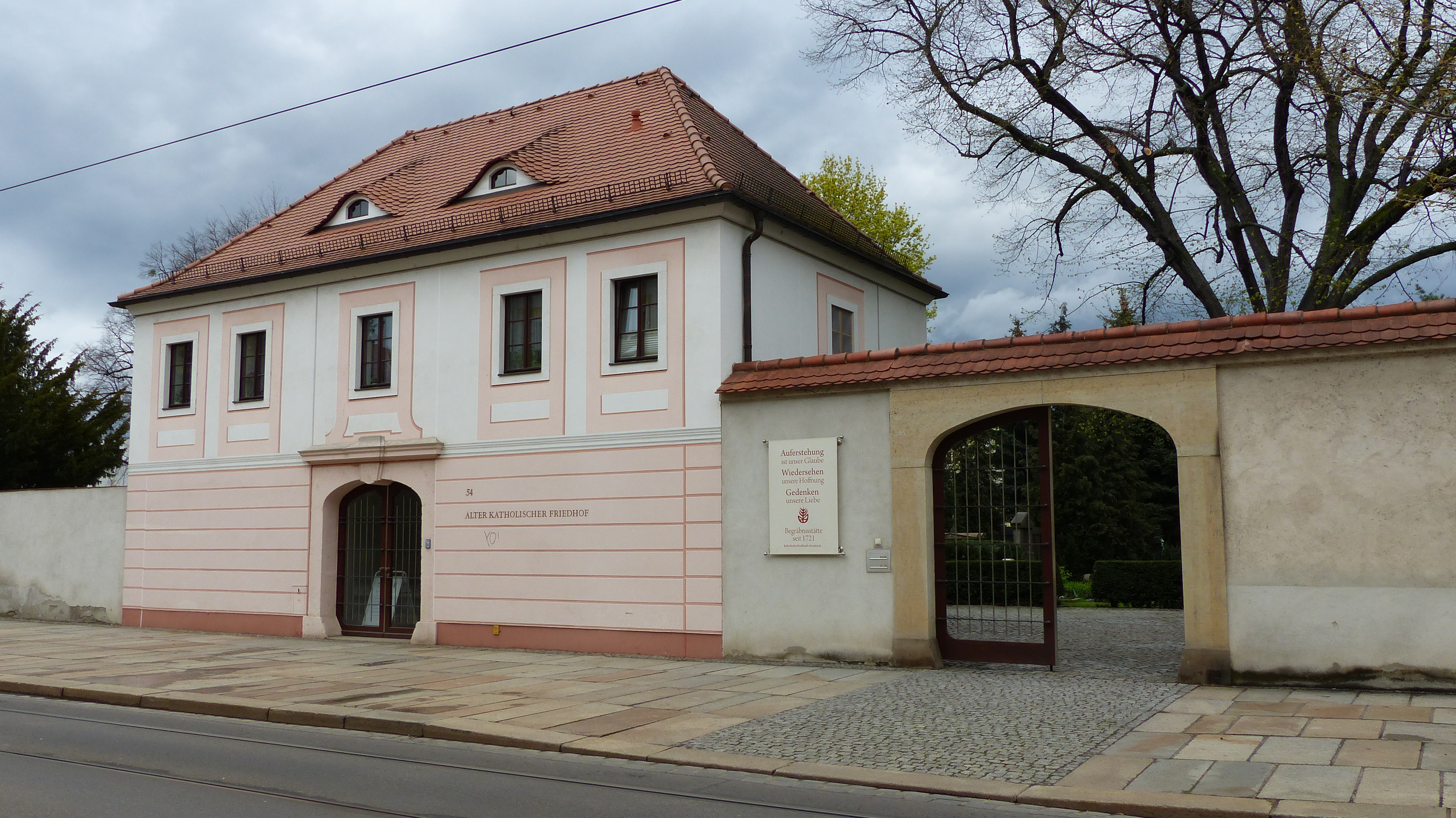 Alter Katholischer Friedhof, Friedrichstraße 54, Dresden